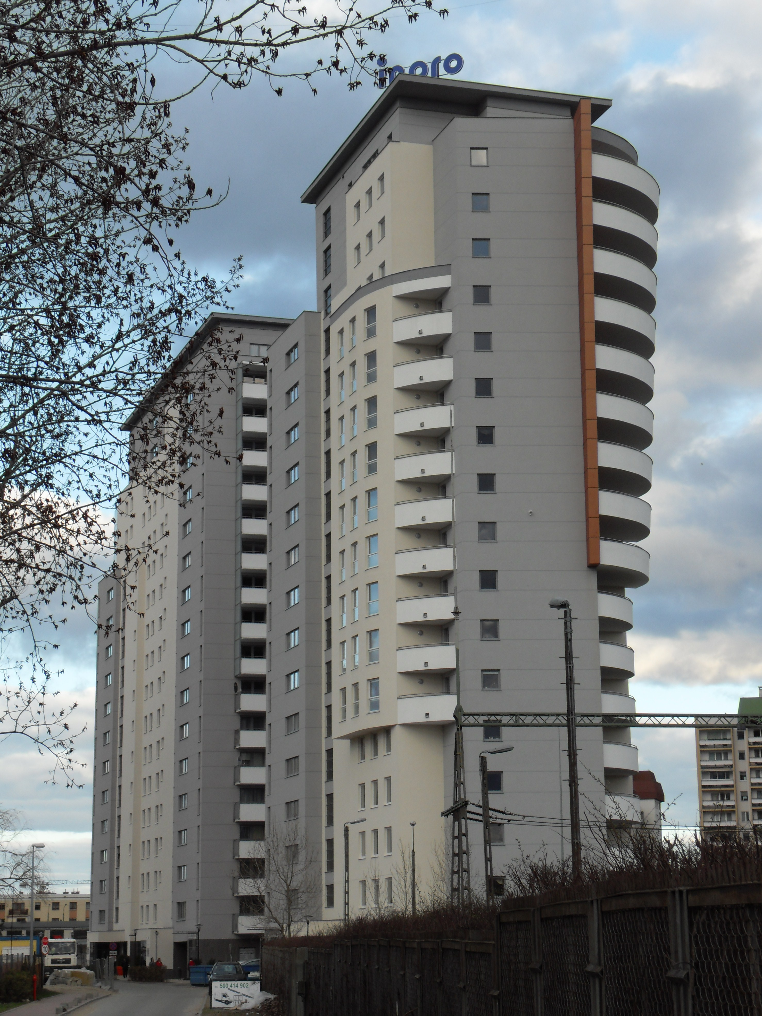 Gdańsk Przymorze, ul. Olsztyńska 3A i 3B (Inpro, "Trzy Żagle").